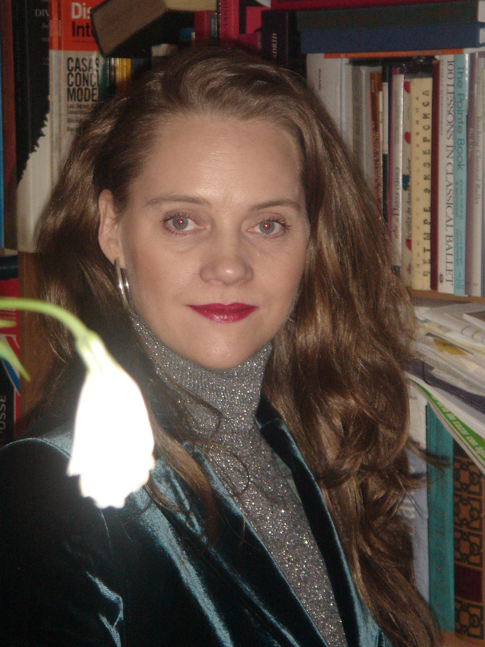 Tatiana Stepanova, en su biblioteca personal